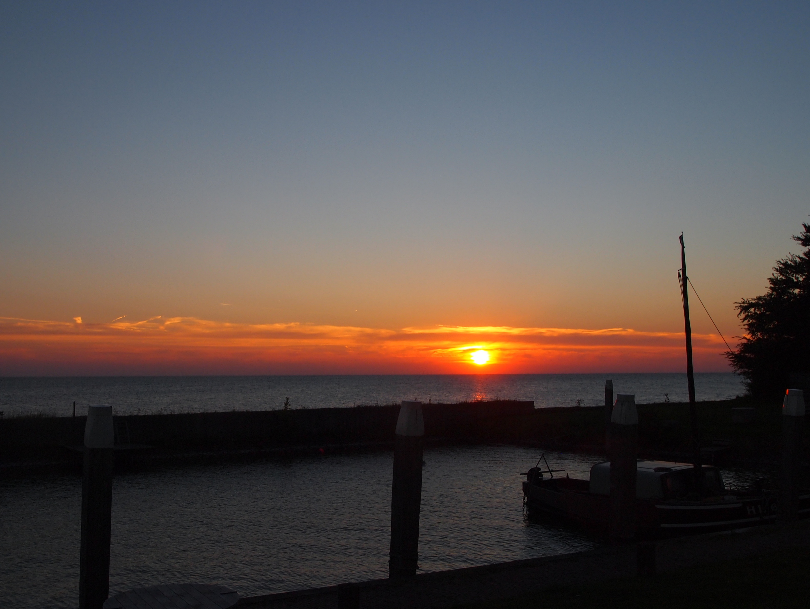 ondergaande Zon in het haventje .